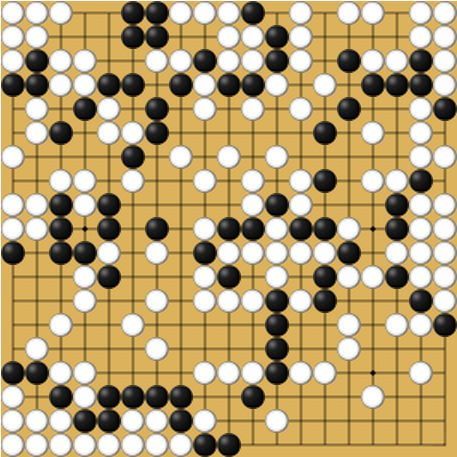 Diagramme du jeu de Go issu de l'ouvrage Igo Hatsuyōron. Problème 76.